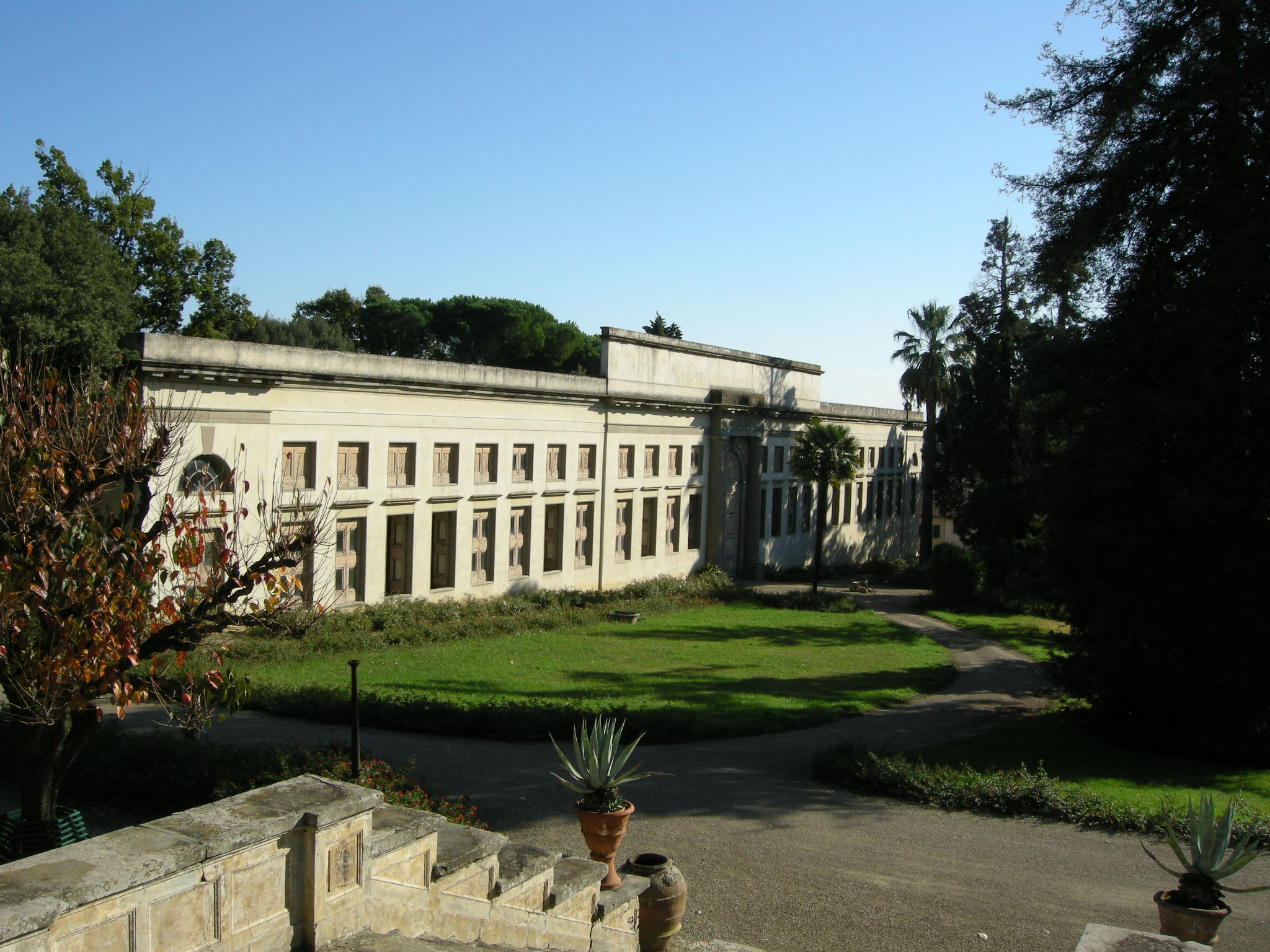 Villa di poggio a caiano, limonaia